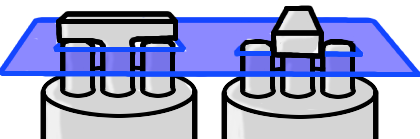 Принцип на заключване "Кензингтън".